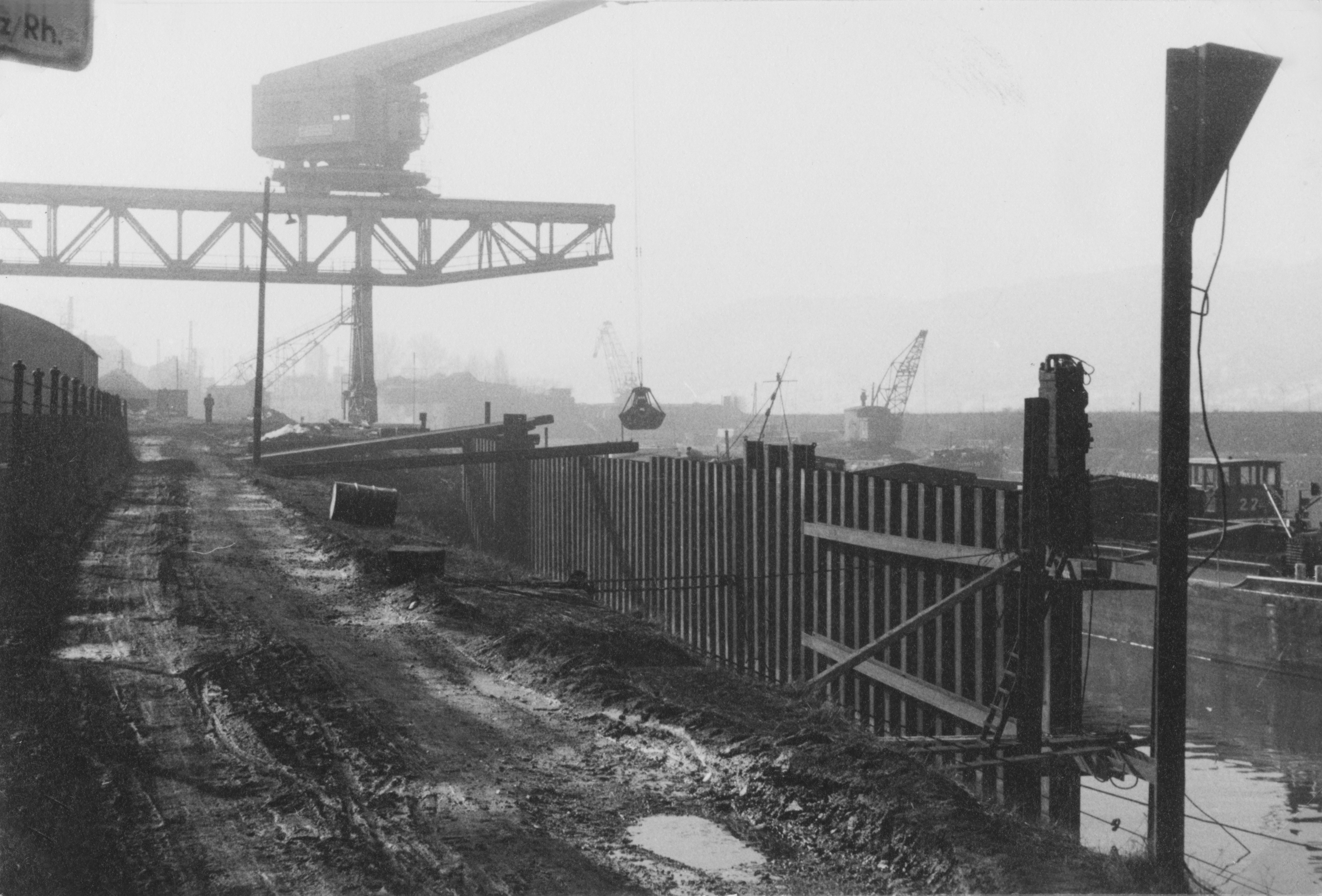 Originalbeschreibung: "Blick auf die Baustelle des 1962 bis 1970 erbauten Hafens. Er liegt parallel zum Rhein. Blick auf den südlichen Bauabschnitt"